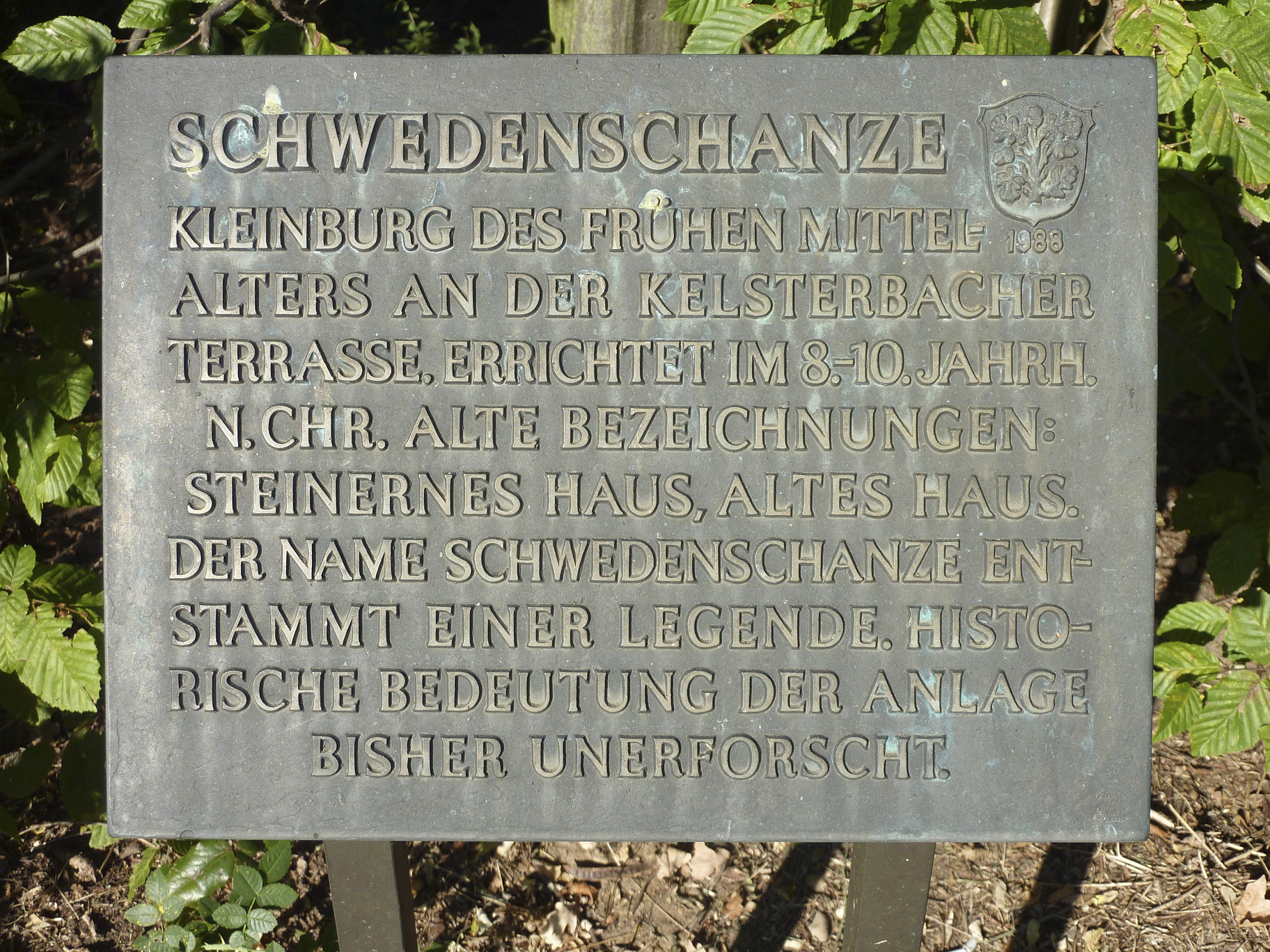 Stadt Kelsterbach, Kreis Groß-Gerau, Bundesland Hessen: Die Schwedenschanze ist ein Erdwall im Norden des Stadtgebiets auf der oberen Kante der Geländestufe Kelsterbacher Terrasse. Der Erdwall wird als Überrest einer mittelalterlichen befestigten Behausung aus dem 8. bis 10. Jahrhundert interpretiert. Das Foto zeigt eine Informationstafel vor Ort